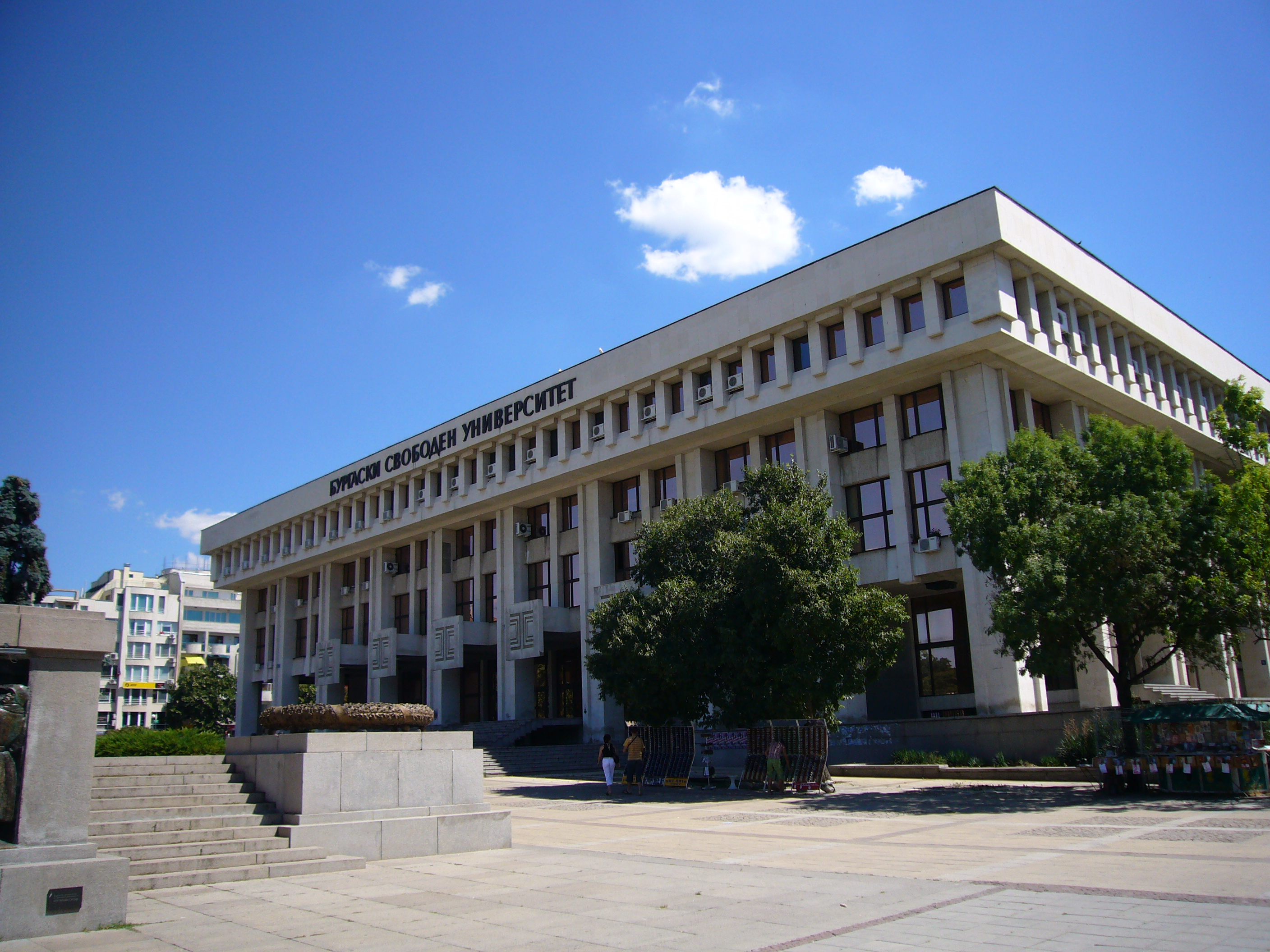 Burgaski Svoboden Universitet, Burgas, Bulgaria.